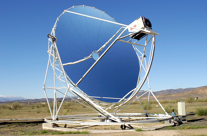 Disco Eurodish